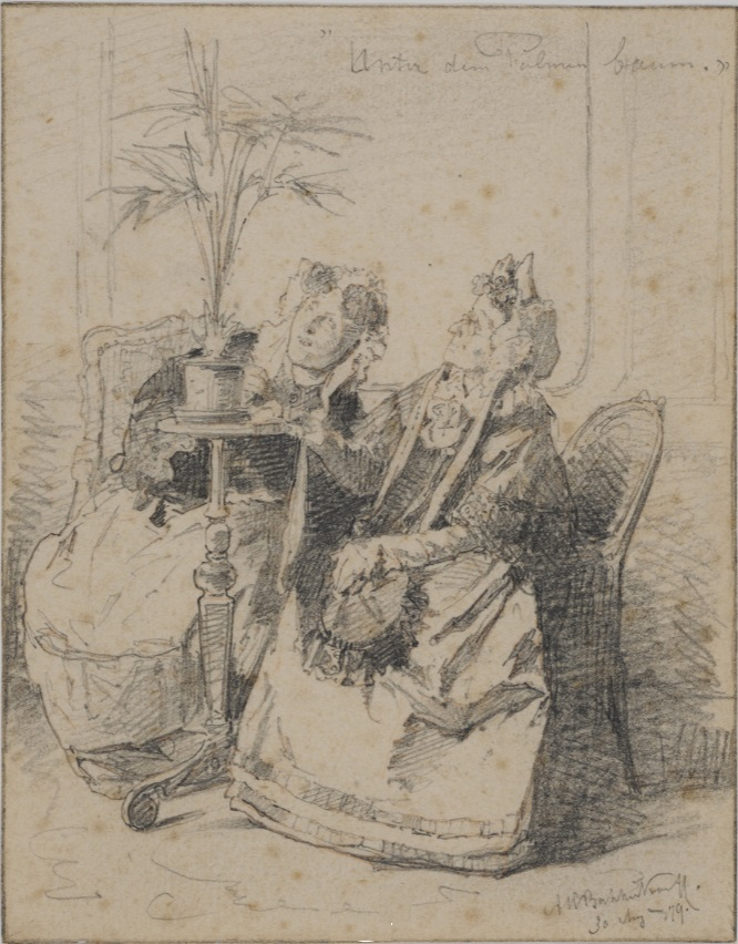 Unter dem Palmbaum, tekening